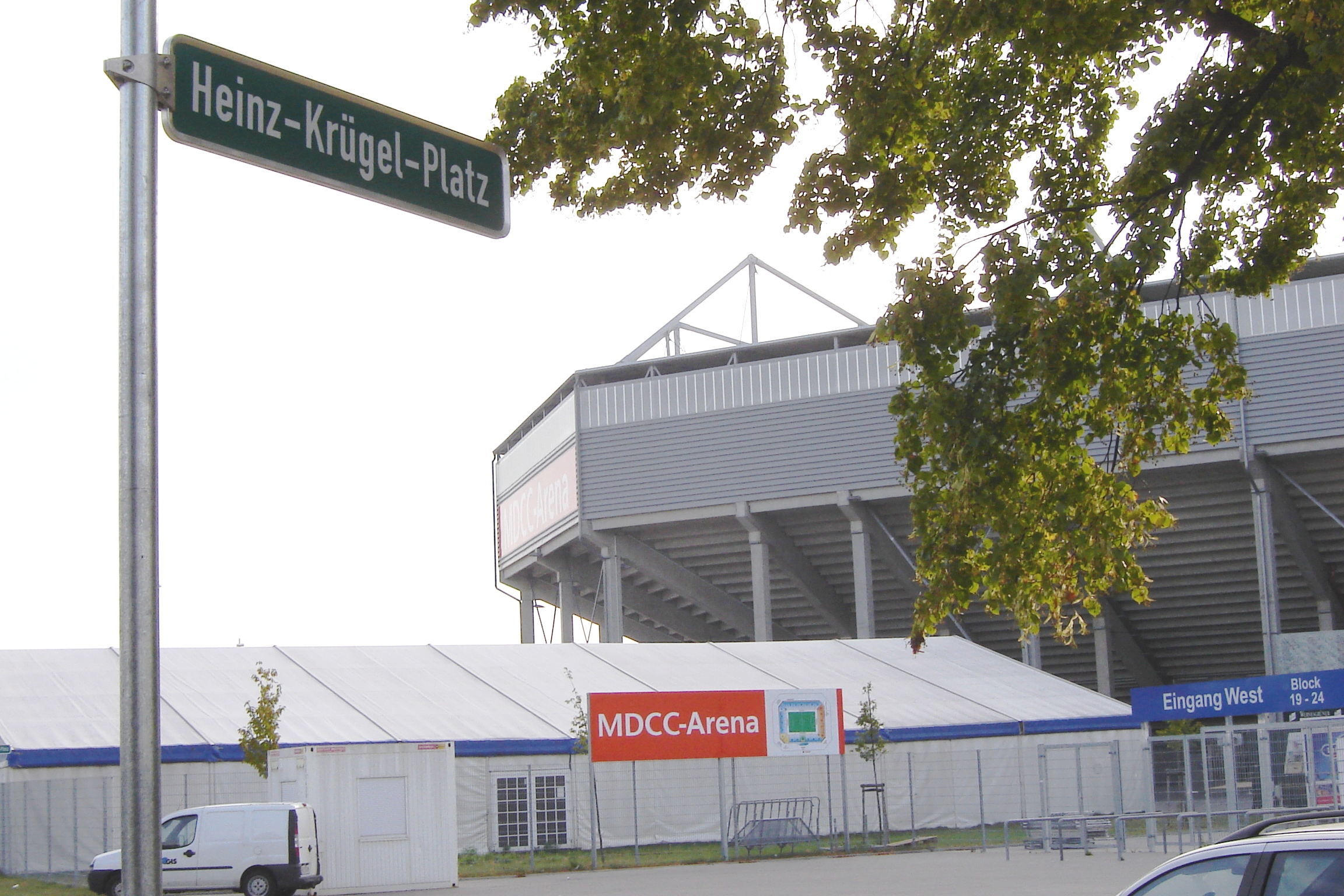 Heinz-Krügel-Platz vor der MDCC-Arena in Magdeburg